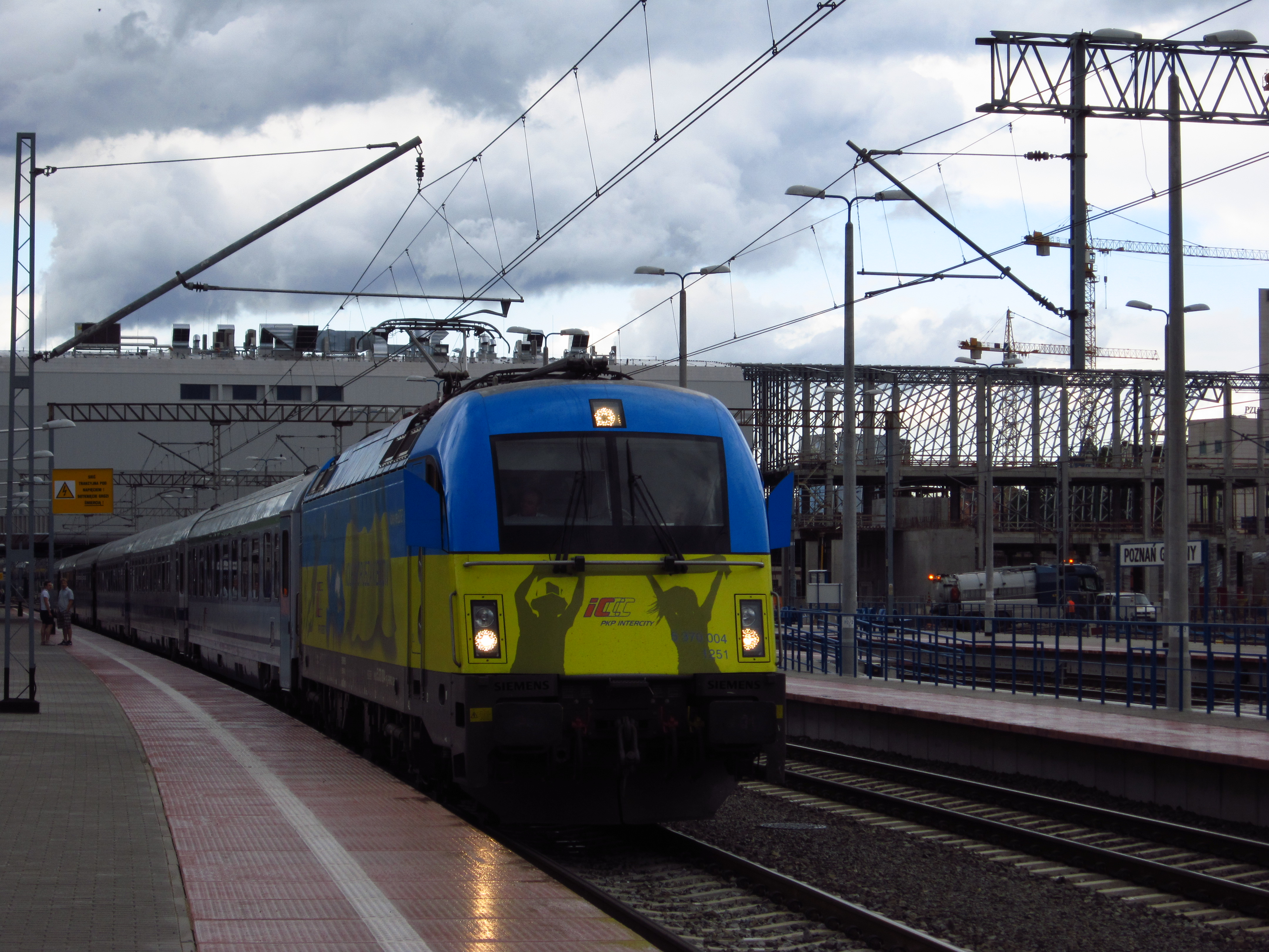 Lokomotywa EU44 oklejona w barwy Ukrainy na czas trwania EURO 2012.